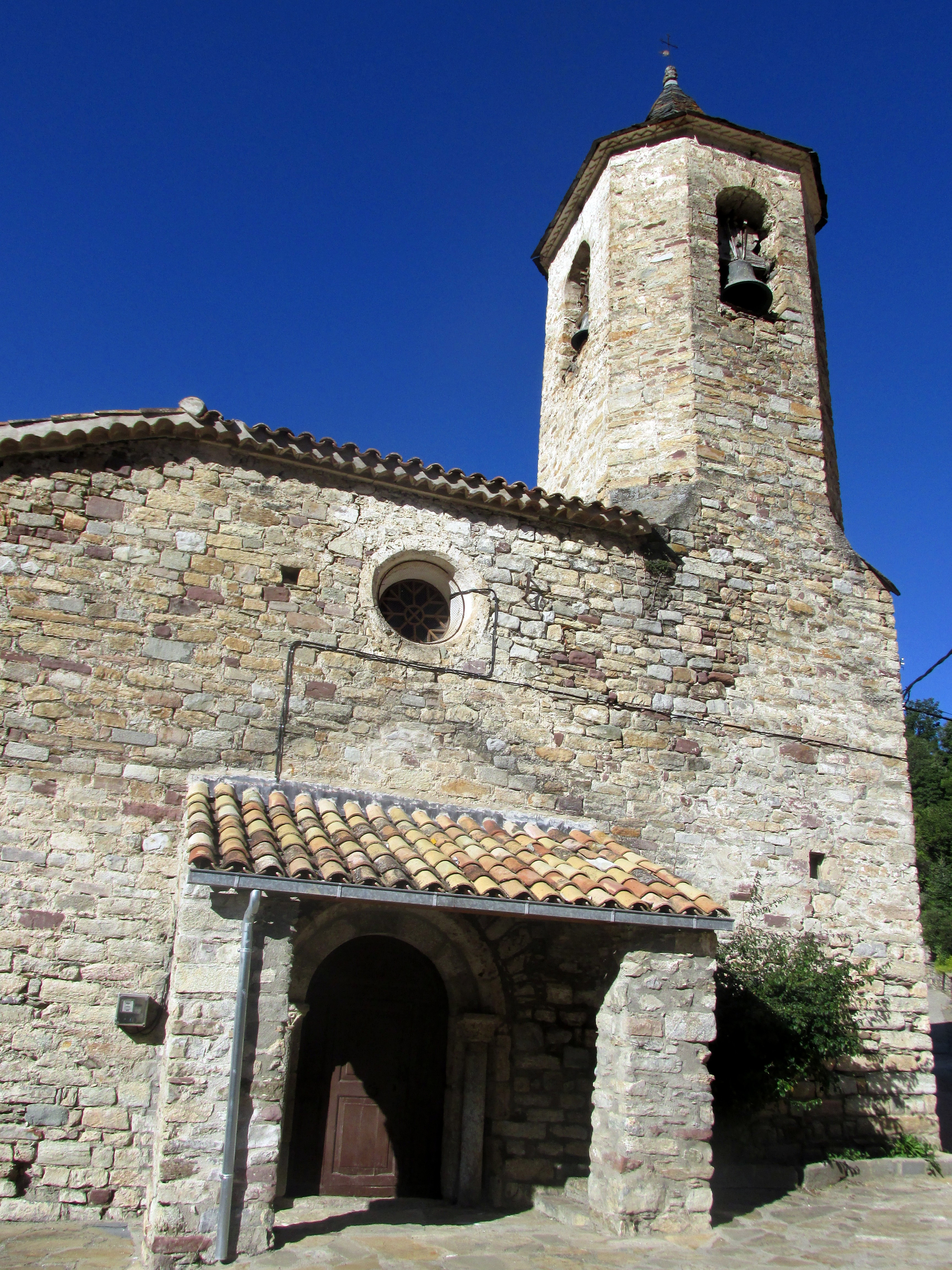 Església Sant Martí de Llesp a la Vall de Boí (Lleida)